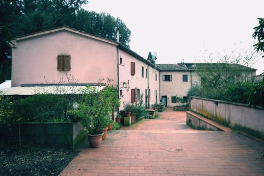 A.Bacci, Borgo di Corliano, Granaio della Fattoria, 2008